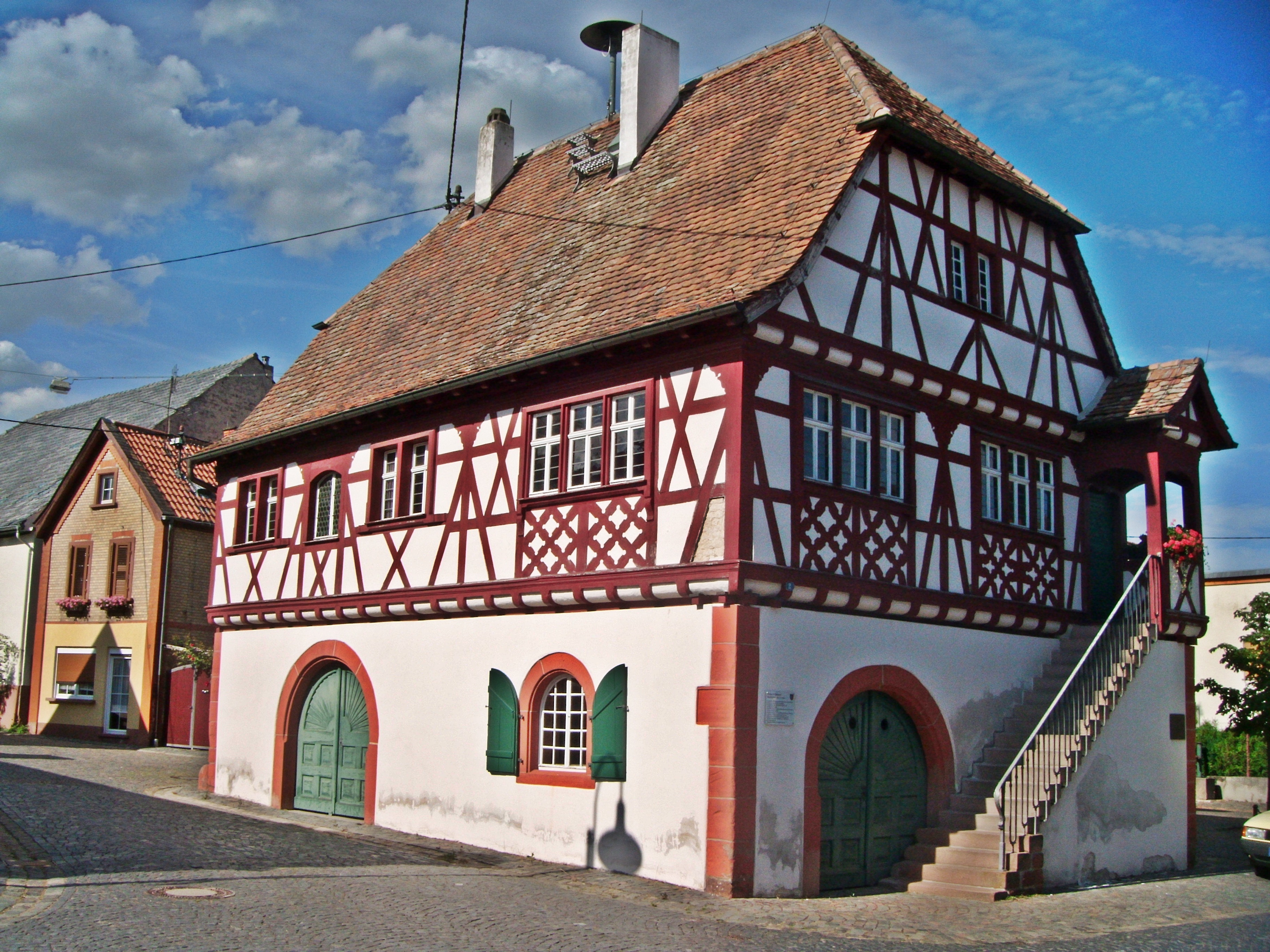 Hohen-Sülzen, Altes Rathaus